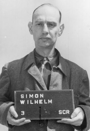 Haftbogenfoto des Angeklagten Wilhelm Simon (23.04.1900 in Wuppertal - 27.09.1971 in Bochum), SS-Oberscharführer, Arbeitseinsatzführer im Konzentrationslager Mittelbau-Dora, im Dachauer Dora-Prozess ("Case No. 000-50-37 Dora") am 30.12.1947 zu lebenslanger Haft verurteilt, 1954 vorzeitige Entlassung.